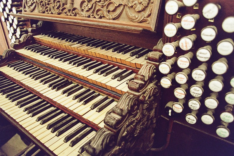 Kerkorgel manualen (eigen opname 2004)